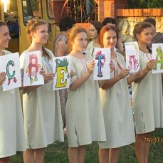 улица Светлая